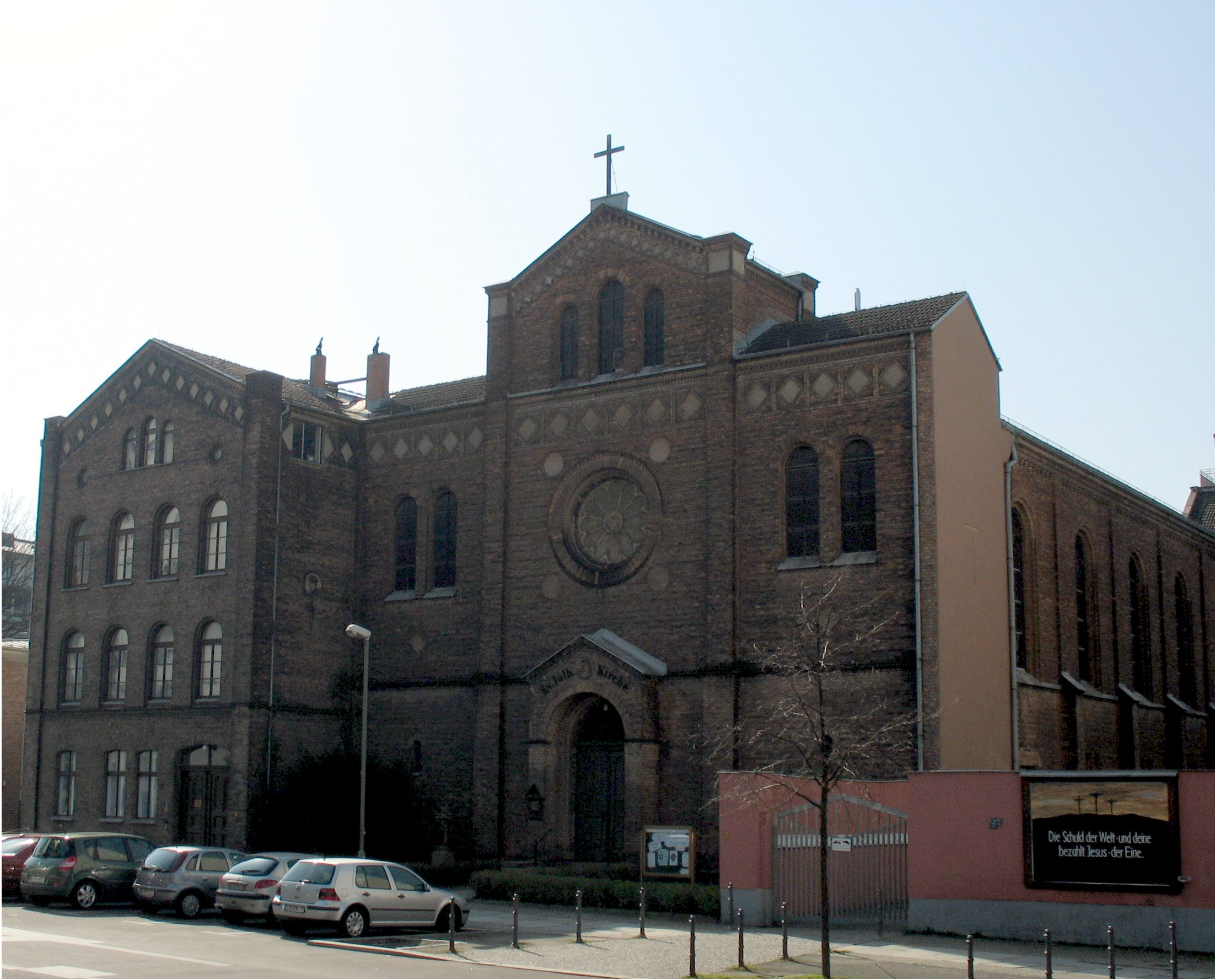 Evangelisch-Lutherische Kirche in der Annenstraße, Berlin-Mitte (Kirche der Selbstständigen Evangelisch- Lutherischen Kirche (SELK))